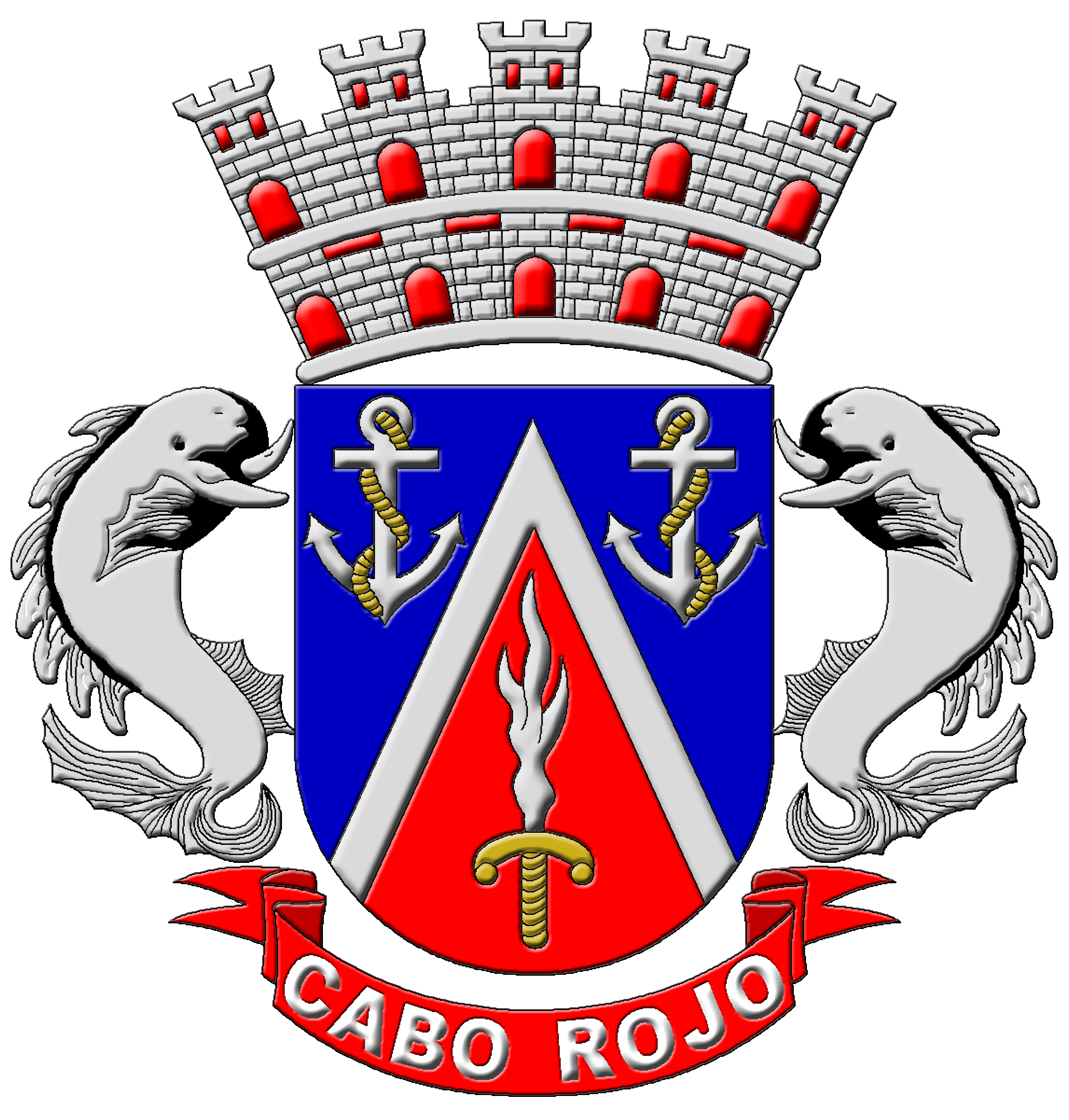 Escudo de Cabo Rojo.